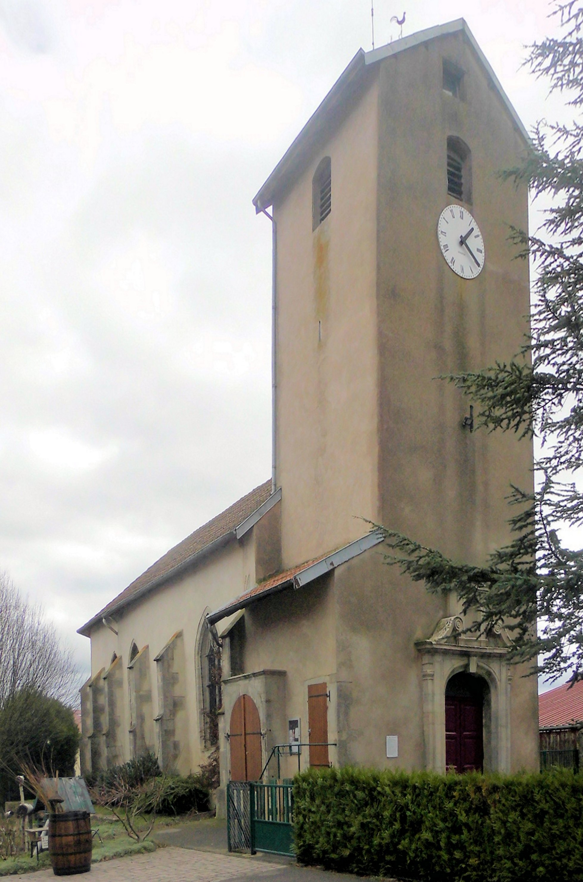 L'église Saint-Epvre de Remenoville